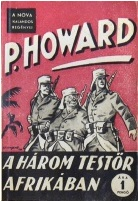 A három testőr afrikában című regény első kiadása.